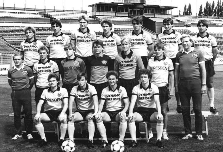 ADN-ZB-Hiekel-9.1.86-kb-Dresden: Fußball. Auslosung. Dynamo Dresden tritt im Viertelfinale des Fußball-Europacups der Pokalsieger auf BRD Pokalgewinner Bayer Uerdingen. Die Begegnung findet am 5. und 19.3. statt. Obere Reihe: Kapitän Hans-Jürgen Dörner, Roland Rüster, Sven Förster, Andreas Trautmann, Ralf Minge, Steffen Büttner und Ulf Kirsten (v. l.). Mittlere Reihe: Assistenztrainer Dieter Riedel, Matthias Döschner, Uwe Kuhl, Bernd Jakubowski, Jens Ramme, Torsten Gütschow und Trainer Klaus Sammer (v. l.). Sitzend: Frank Lippmann, Jörg Stübner, Reinhard Häfner und Hans-Uwe Pilz (v. l.).